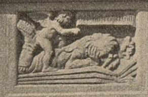 Ehemaliges Haus Zeller, Stuttgart, Reinsburgstraße 20, Relief „Mährchen vom sichern Mann“ von Jakob Brüllmann, 1903.